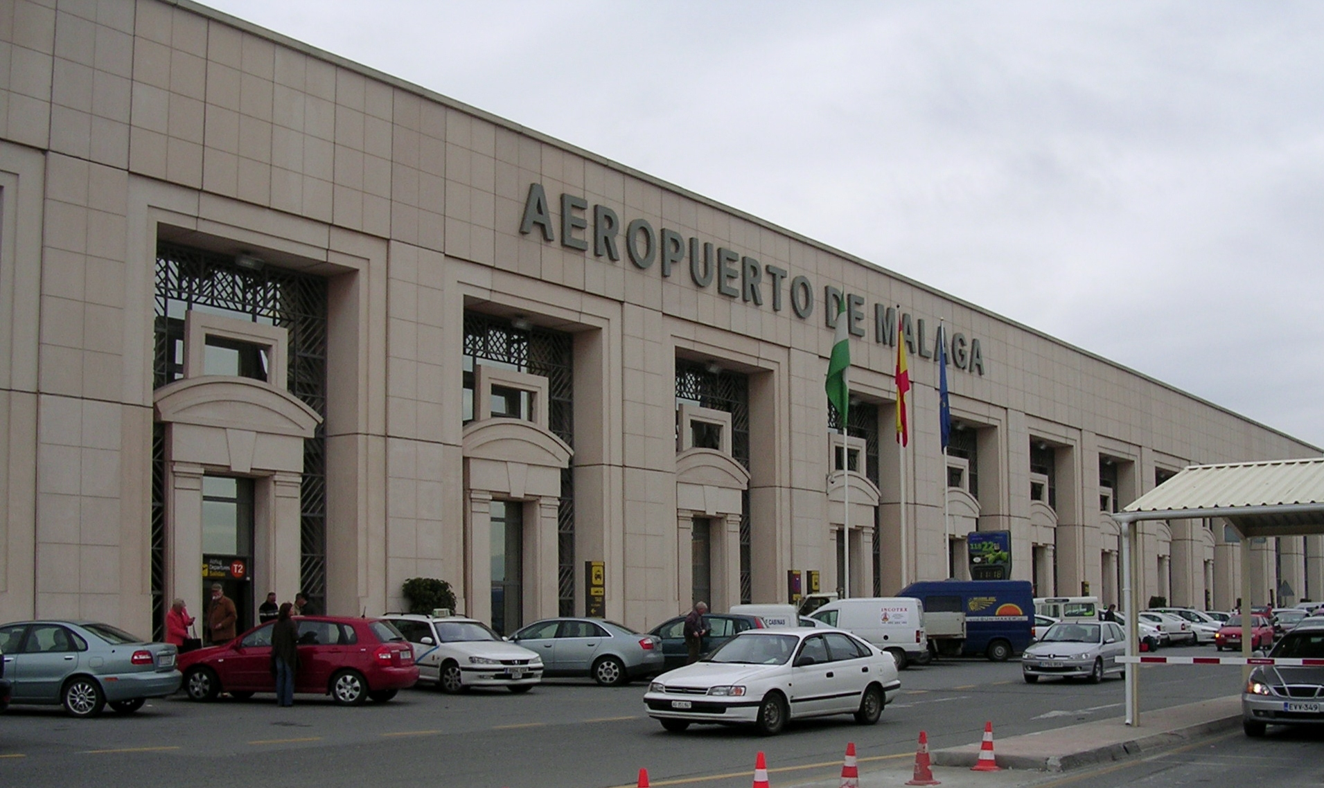 Malaga Airport Façade